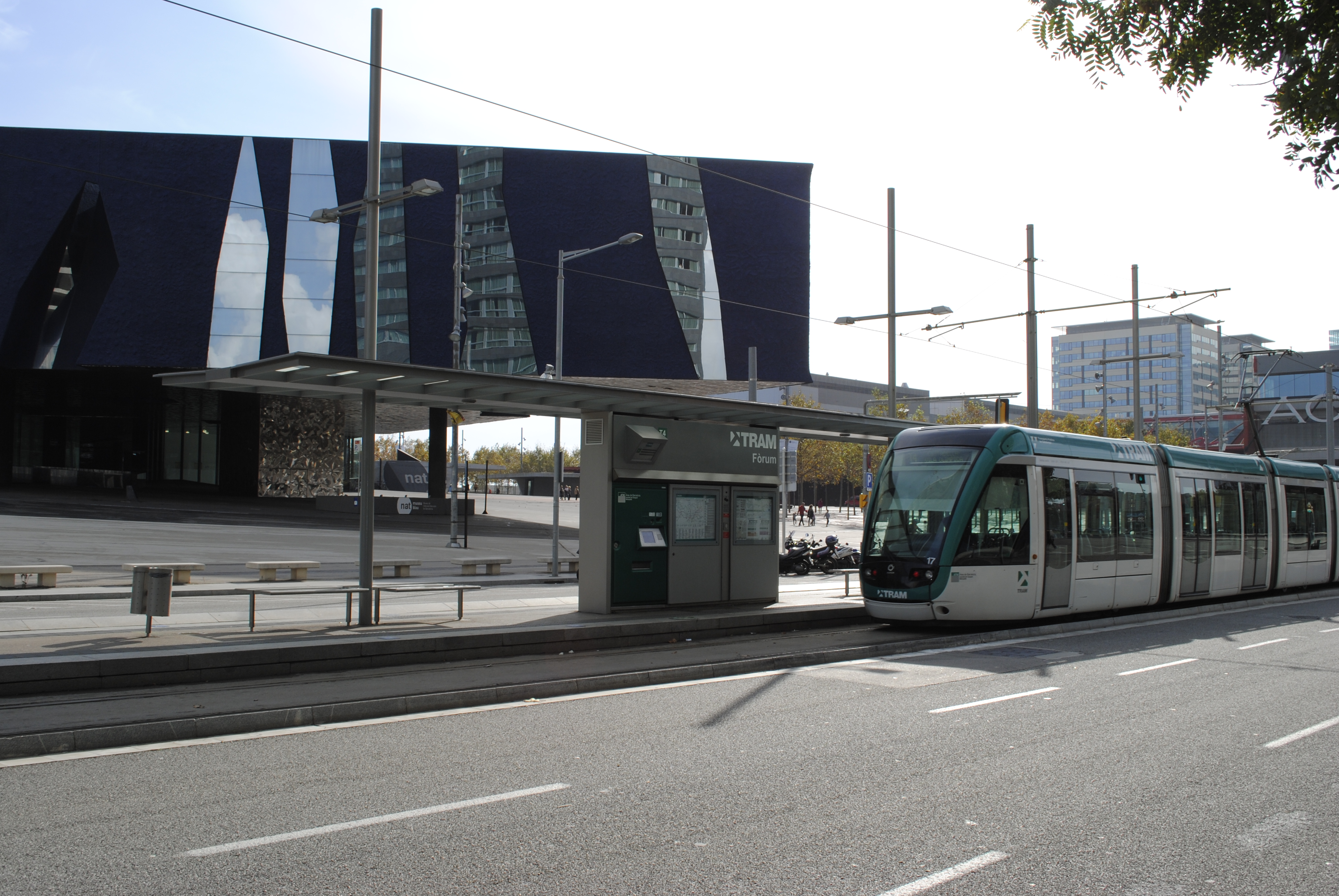 Estació de Fòrum (Trambesòs)